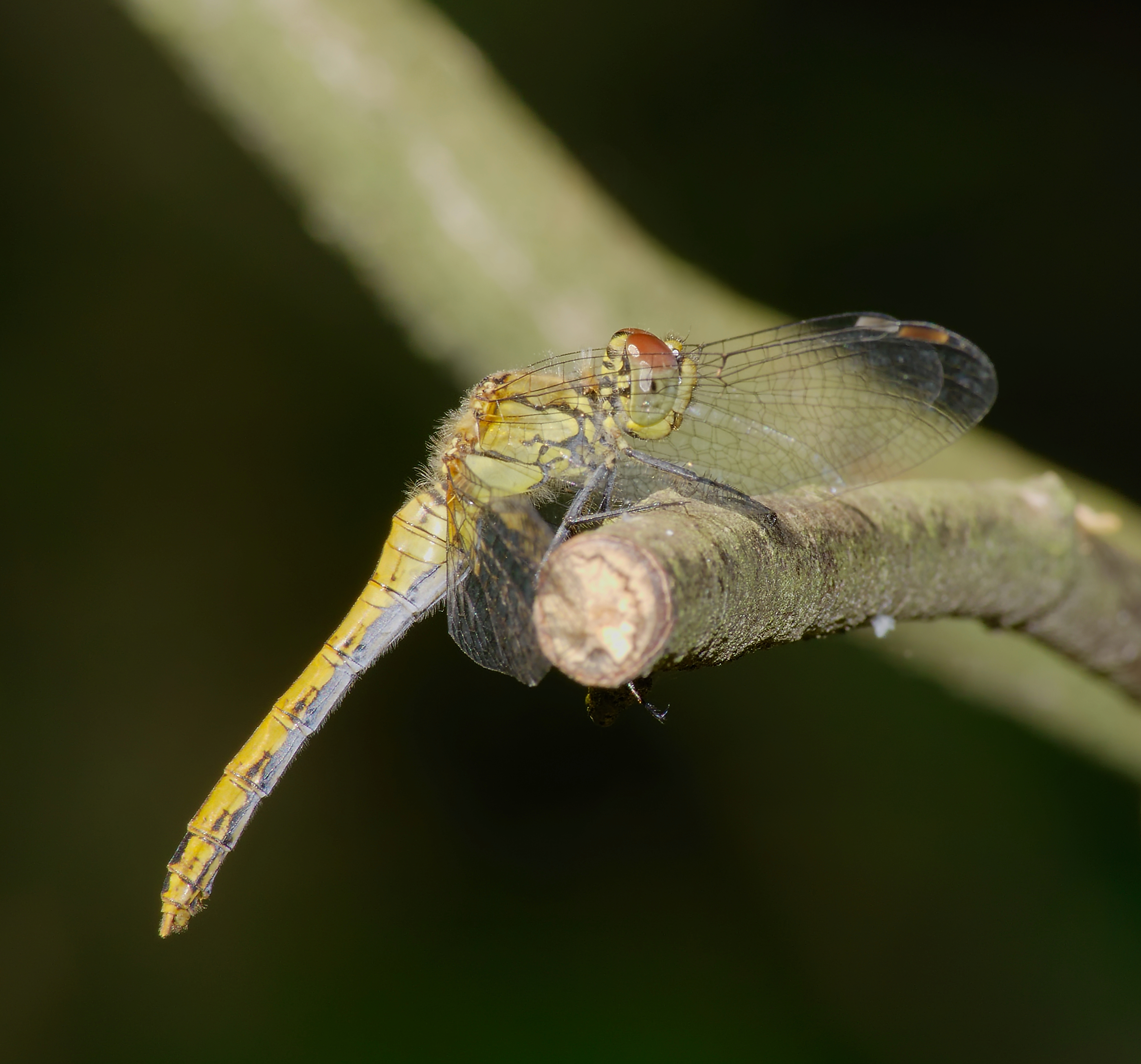 Blutrote Heidelibelle - Sympetrum sanguineum, Weibchen. Aufgenommen in Wöllnau Winkelmühle, Doberschütz, Sachsen, Deutschland.